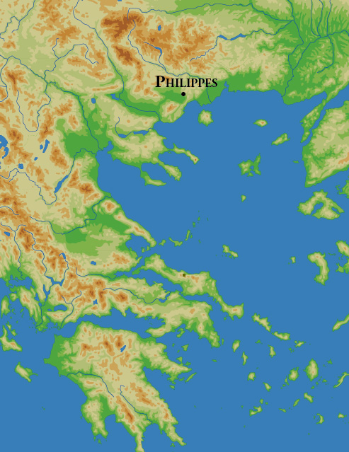 Filipos, en la Macedonia Oriental Drawing by Marsyas.